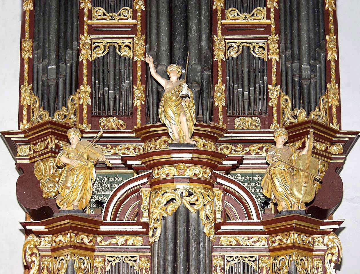 Schnitger Organ Cappel